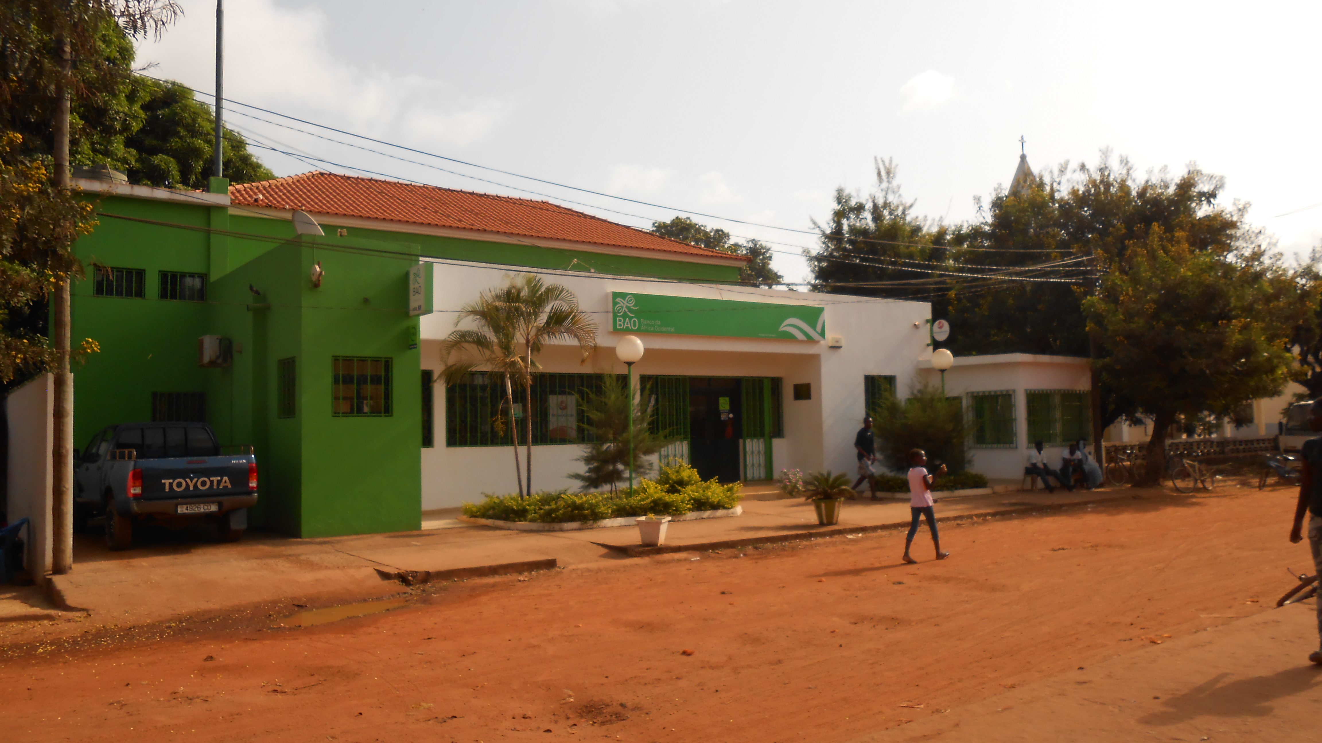 Balcão do Banco da África Ocidental (BAO) em Canchungo.